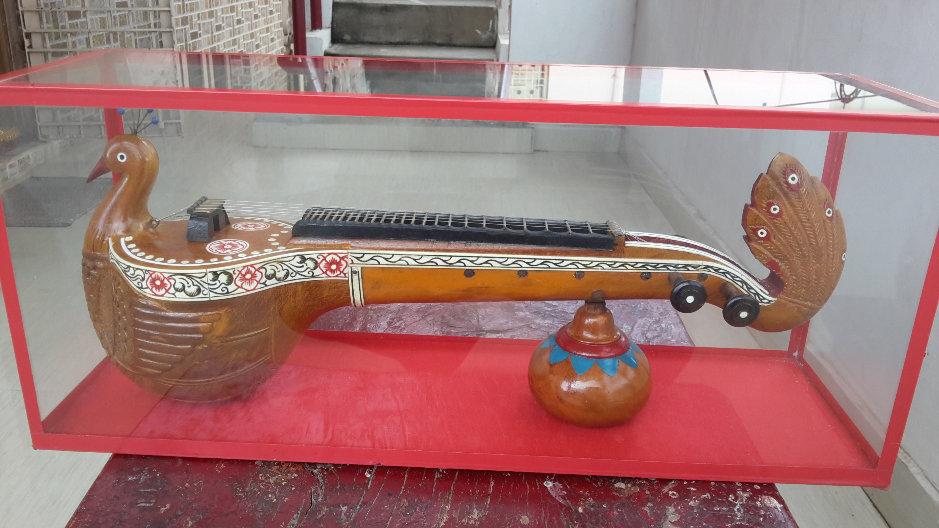 Bobbiliveenafordecoration